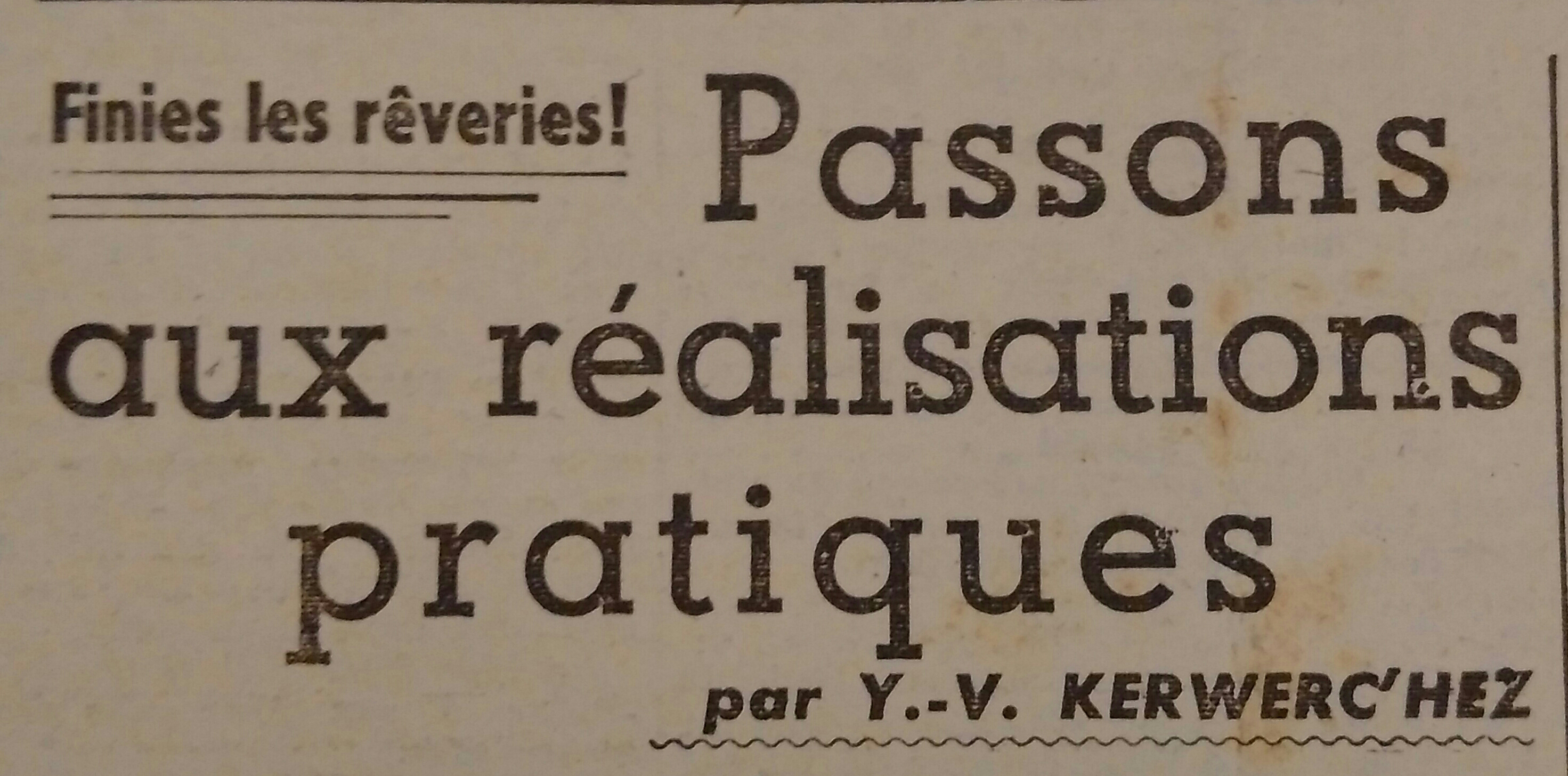 Logo ar gronikenn Kevar er gazetenn l'Heure Bretonne (Niverenn 176, 5 a viz Kerzu 1943)